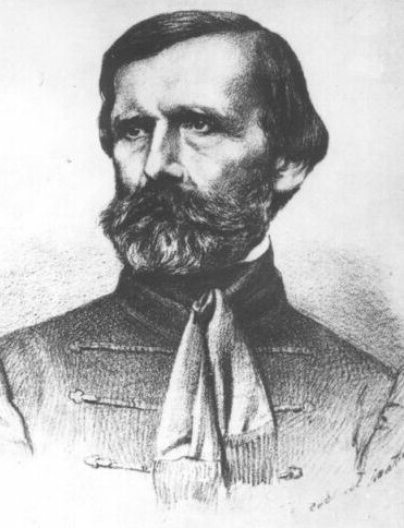 Reitter Ferenc magyar vízépítő mérnök, a Magyar Tudományos Akadémia levelező tagja